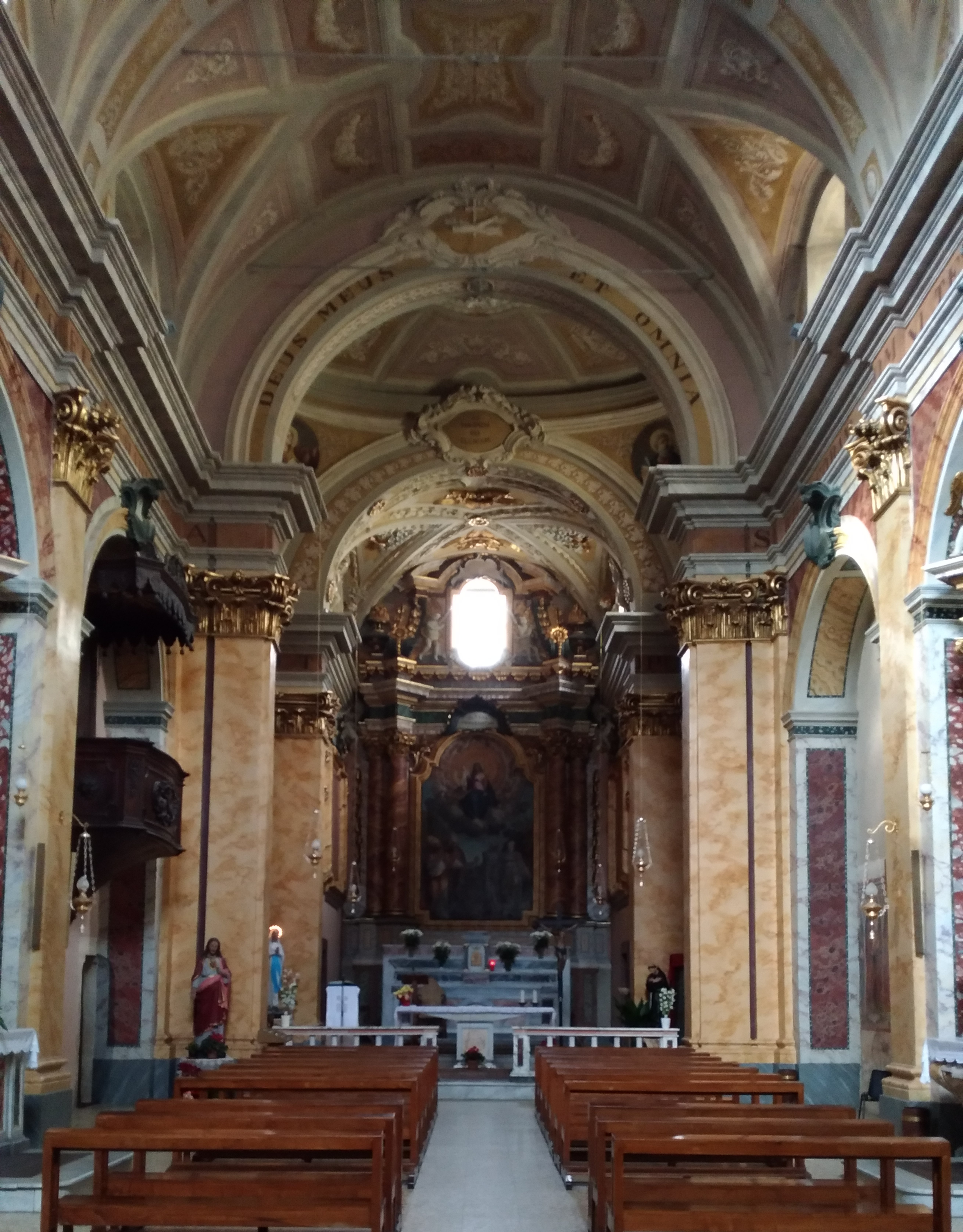 Chiesa di San Francesco (Alatri), interno